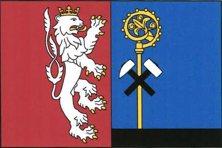 vlajka, Hrob, okres Teplice